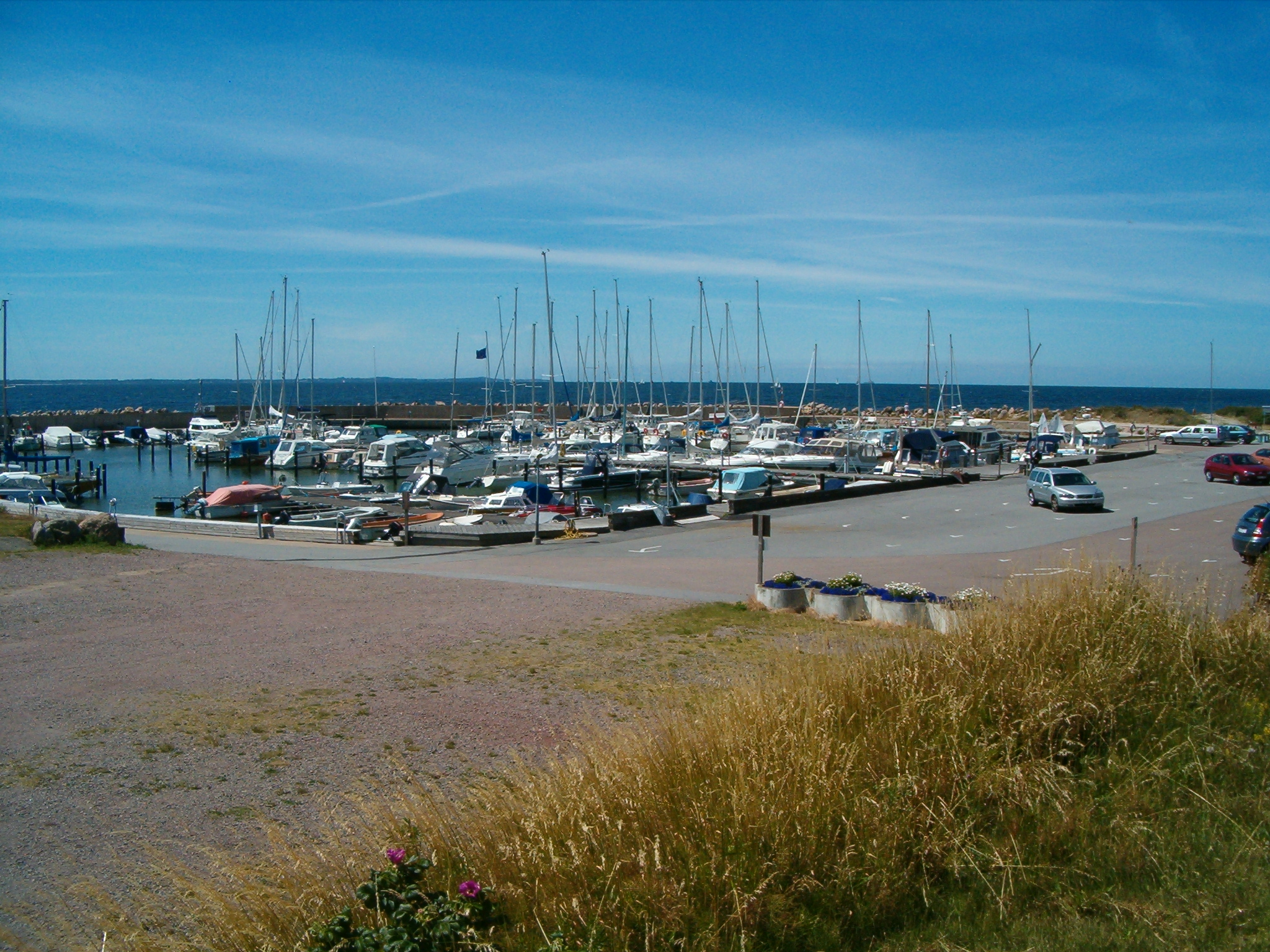 Småbåtshamnen i Domsten, Helsingborgs kommun.